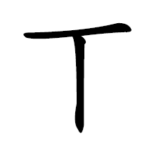 си чжуинь